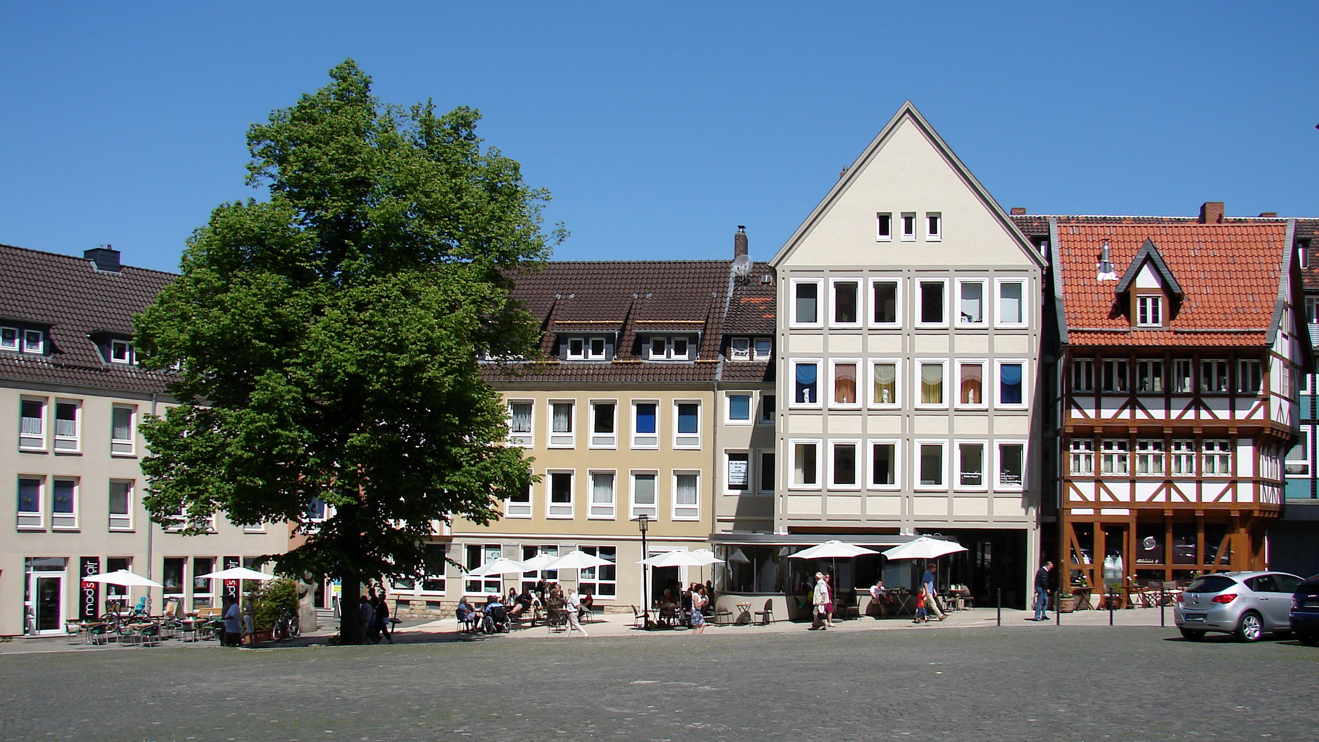 Der Andreasplatz in Hildesheim ist der Platz um die Hildesheimer Andreaskirche. Er befindet sich im Privateigentum der evangelisch-lutherischen St. Andreas-Gemeinde, ist jedoch öffentlich zugänglich und wird heute als Ausweichstandort für den Wochenmarkt genutzt.